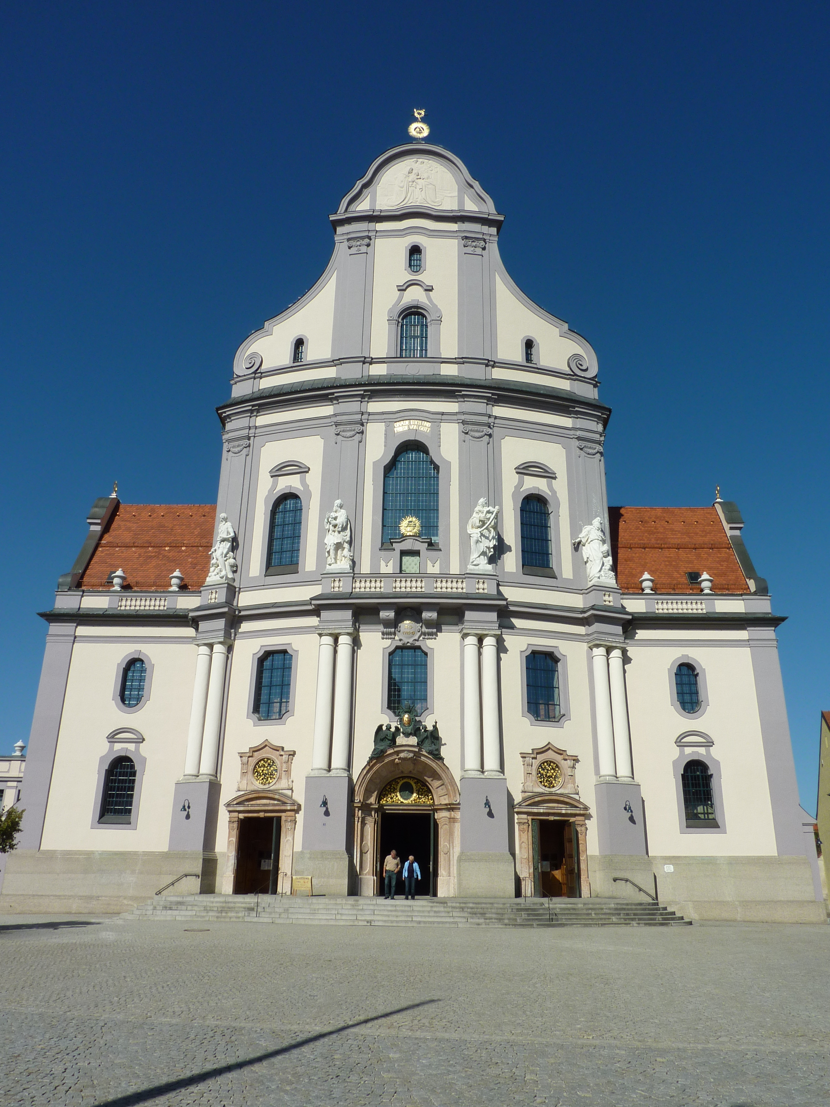 Altötting, Basilika St. Anna. Südostfassade zum Bruder-Konrad-Platz.